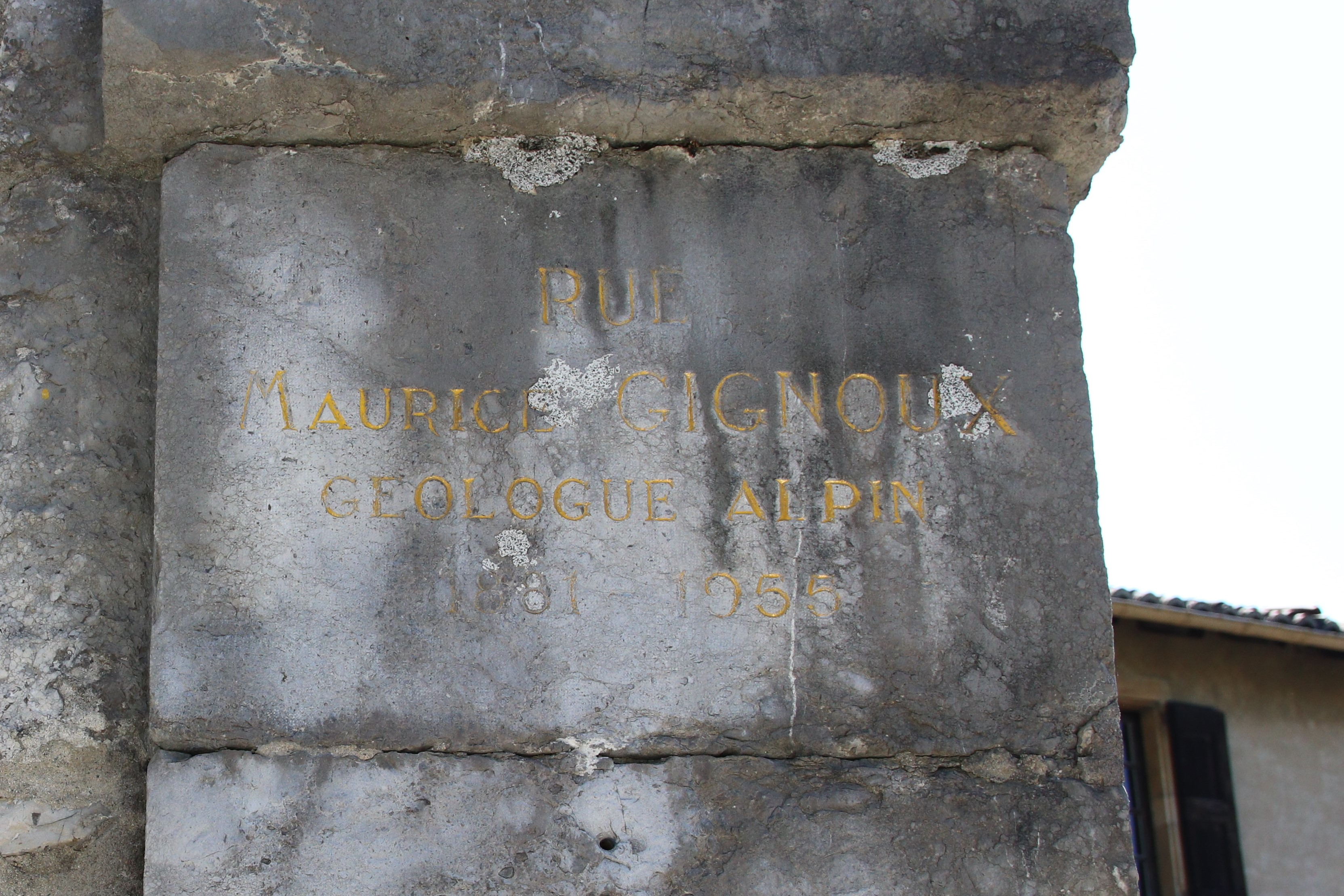 Intitulé de la rue Maurice Gignoux à Grenoble, à l'entrée du Musée Dauphinois.